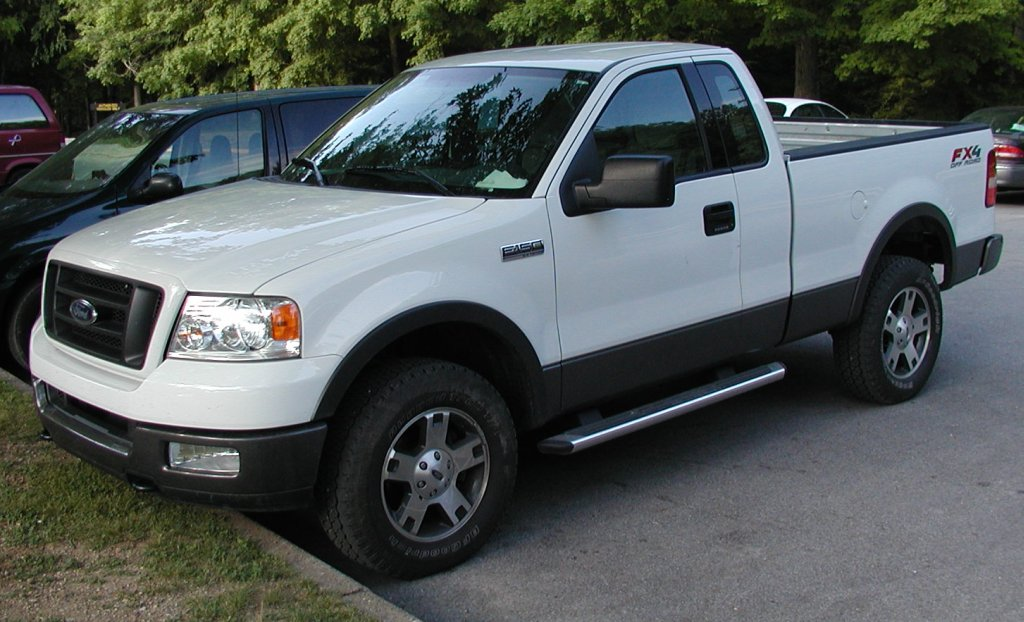 Ford F-150 Pickup Truck. Modelljahr 2004. Kurzer Radstand, Kurze Ladefläche, Standard-Kabine, FX4 Offroad-Paket.